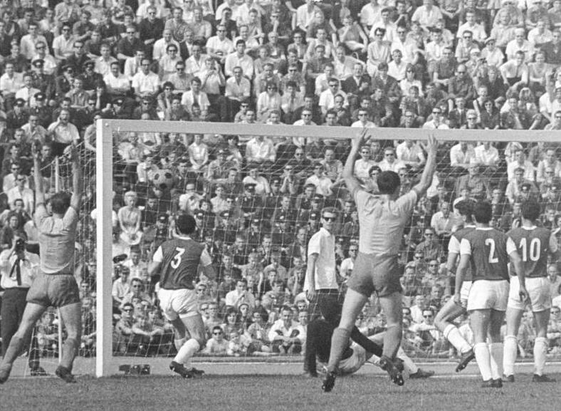 Zentralbild-Studré stu-at. 14.5.1966 Berlin: Deutsche Fußballmeisterschaft 1966 - FC Vorwärts Berlin - FC Carl Zeiss Jena 2:0 - Das 1:0 fiel in der ersten Halbzeit durch Jürgen Nöldner (FC Vorw.). Unser Bild zeigt dieses erste Tor. V.l.n.r.: Wruck (FC Vorw.), Marx (Jena), Otto und mit der Nr. 10 Krauss (beide Jena). Das Meisterschaftsspiel fand am 14.5.66 im Berliner Jahn-Stadion vor ca. 30.000 Zuschauern statt und endete mit einem verdienten 2:0 Sieg für den FC Vorwärts Berlin. Beide Tore schoss Jürgen Nöldner.